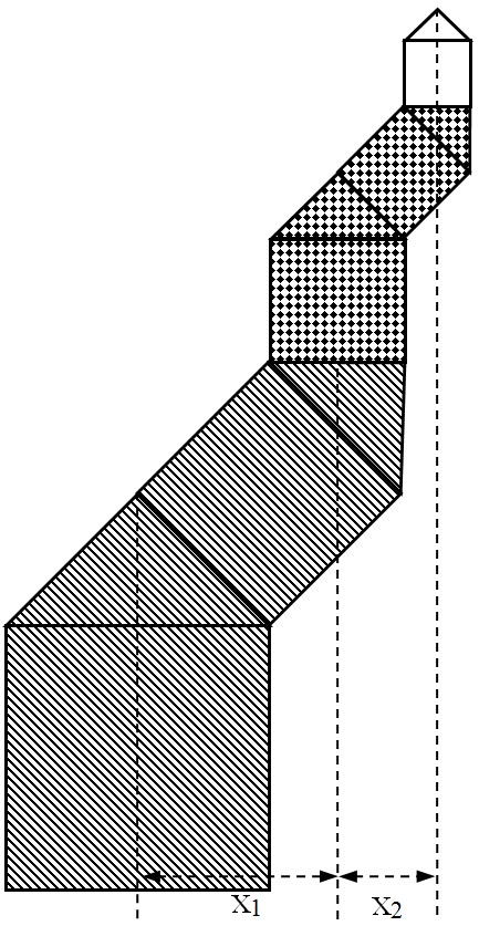 Rechts-Links-Rechts-Ast eines Pythagorasbaumes